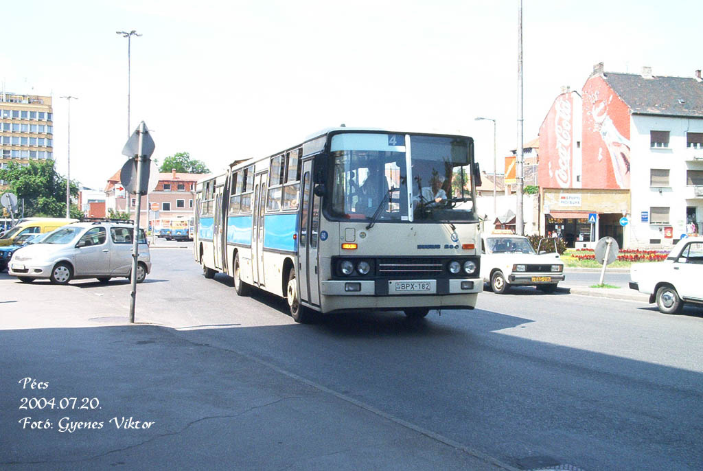 Ikarus 280-as Pécsett a 4-es vonalon